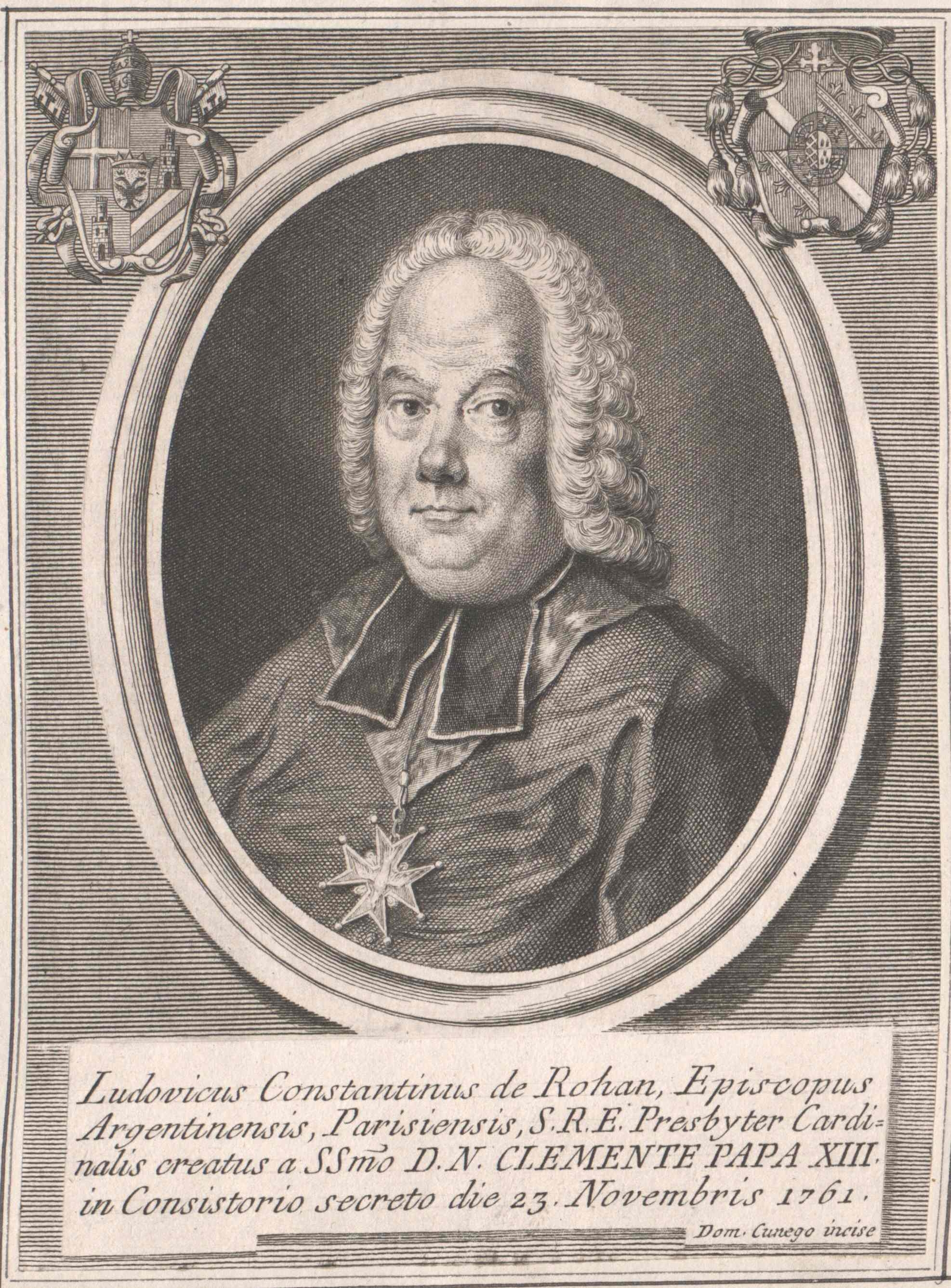 Zeitgenössisches Porträt des Kardinals Louis César Constantin de Rohan (1697-1779), Bischof von Straßburg